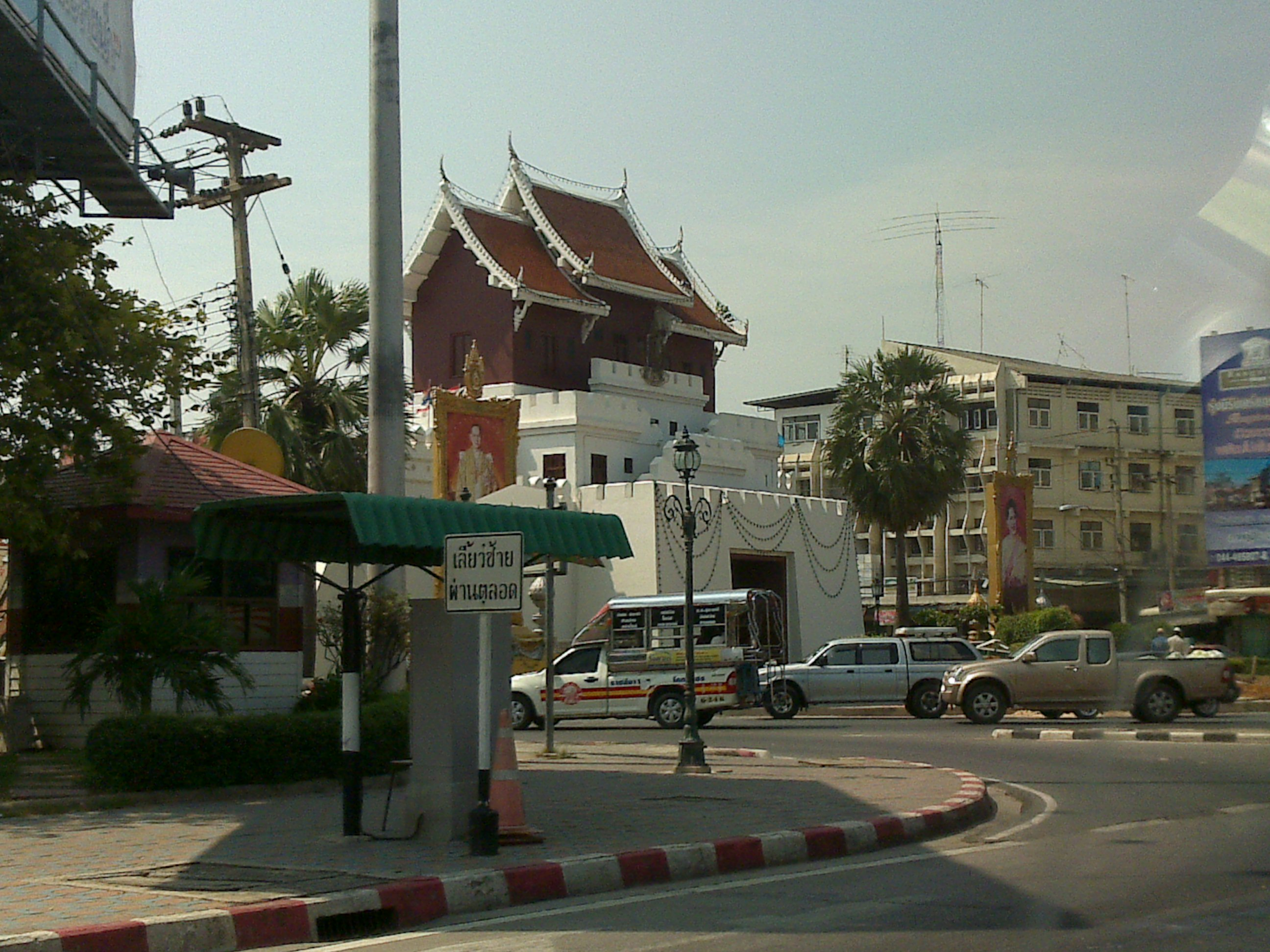 ประตูเมืองนครราชสีมา ไม่ทราบชื่อ